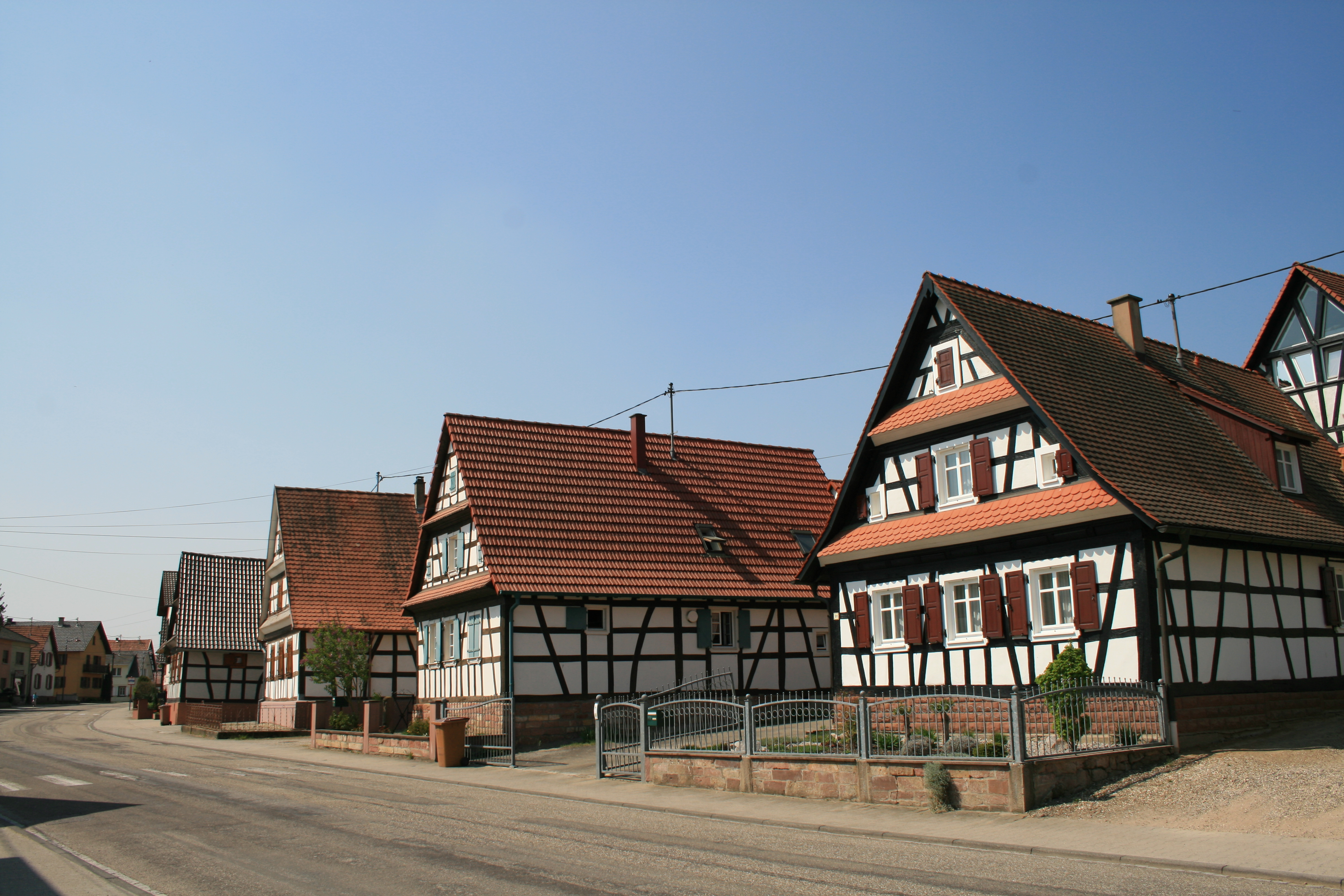 Niederlauterbach, Alsace